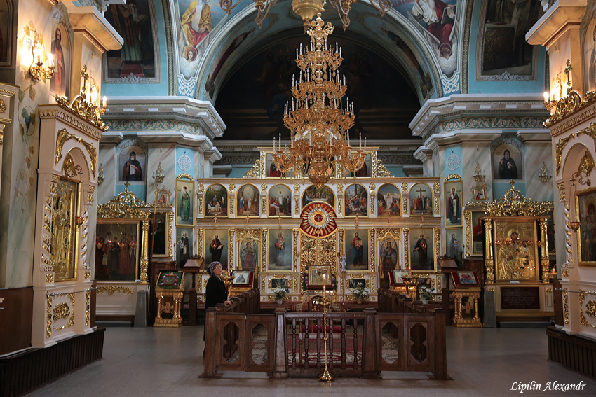 Гомельскі палацава-паркавы комплекс. Іканастас сабора